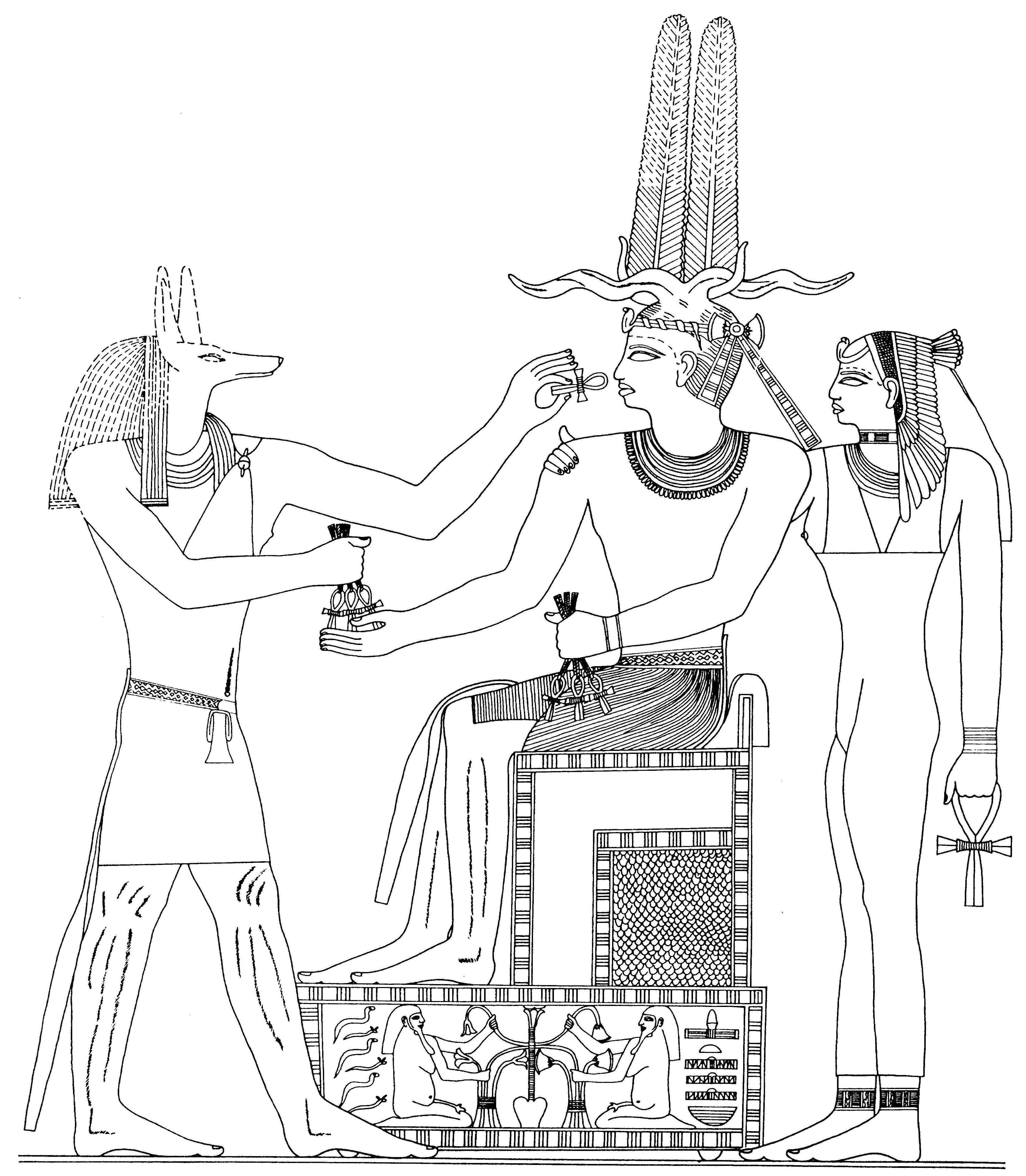 Panovník Niuserre ve společnosti bohů; reliéfová výzdoba zádušního chrámu pyramidového komplexu